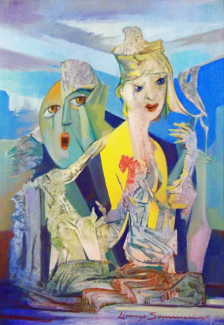 Quadro di Licurgo Sommariva: La signora